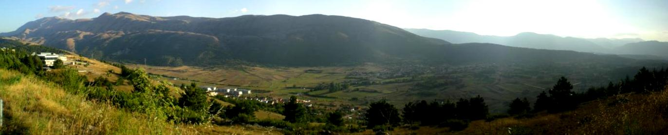 Visuale della piana di Roio da Monteluco: a sinistra sono visibile alcune strutture della Facoltà di Ingegneria dell'Università dell'Aquila, mentre al centro, nel mezzo della piana, è il paese di Roio Piano, un tempo comune autonomo e oggi frazione del comune dell'Aquila.